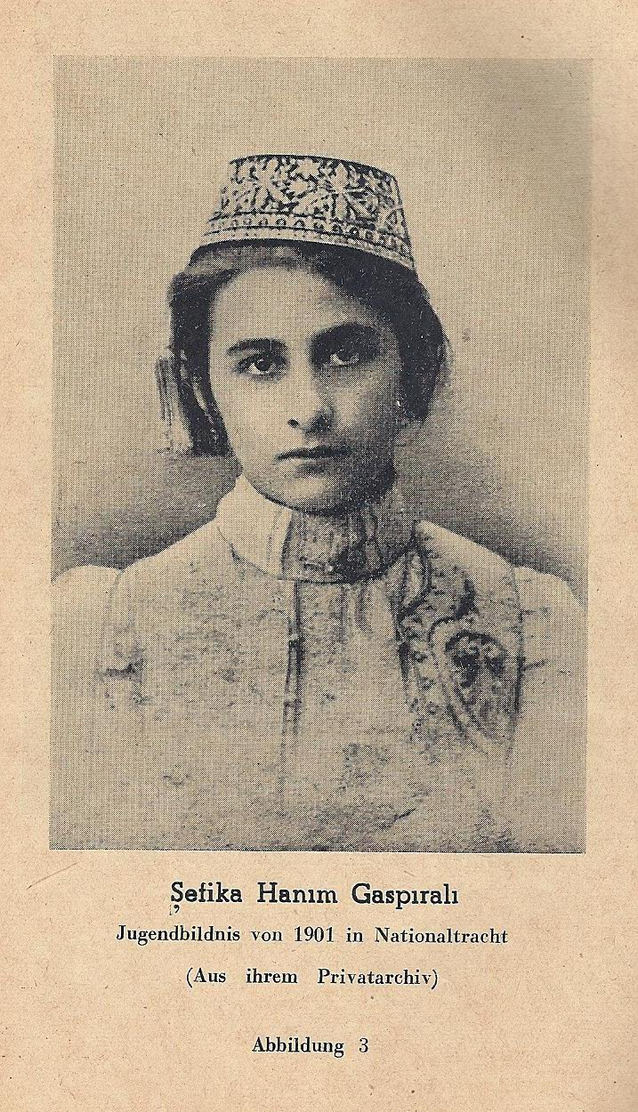 Шефика Гаспринская, 1901 год.